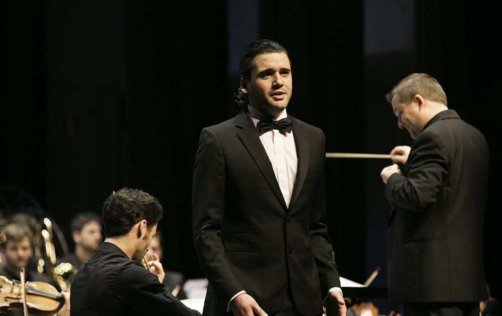 Tenor Reinaud Van Mechelen samen met Frascati Symphonic olv dirigent Kris Stroobants